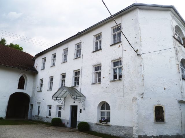 Schloss_Spitzenberg_-_Innenhof